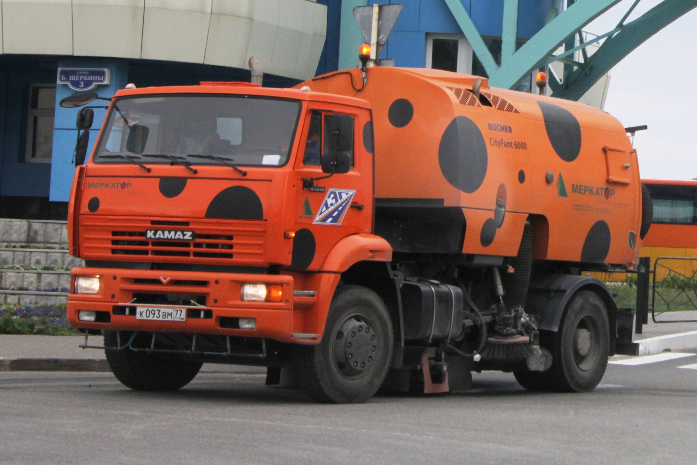 Bucher City Fant 6000 auf Basis eines KamAZ-53605 in Chanti-Mansijsk, Sommer 2014.